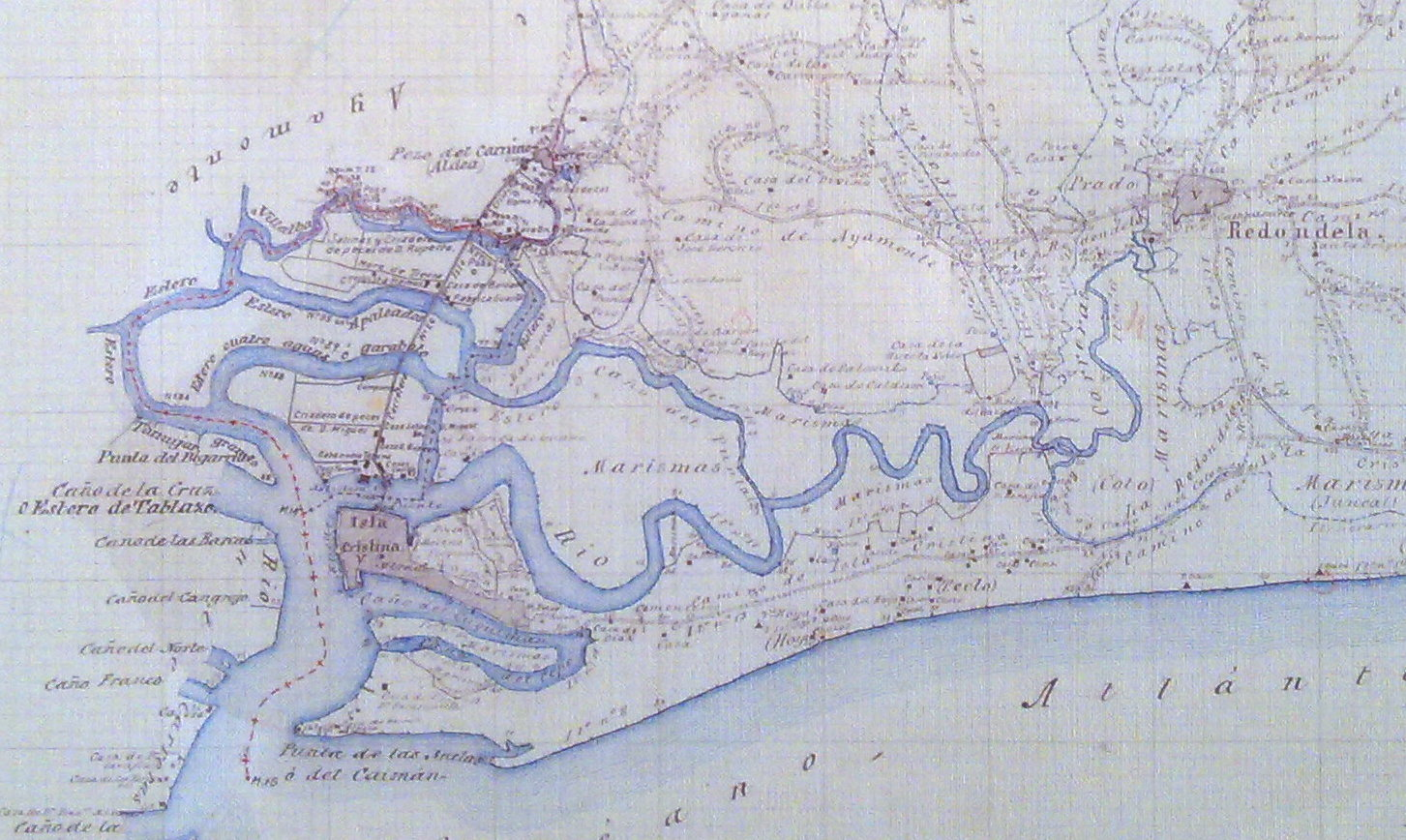 Mapa fechado hacia 1890 de Isla Cristina